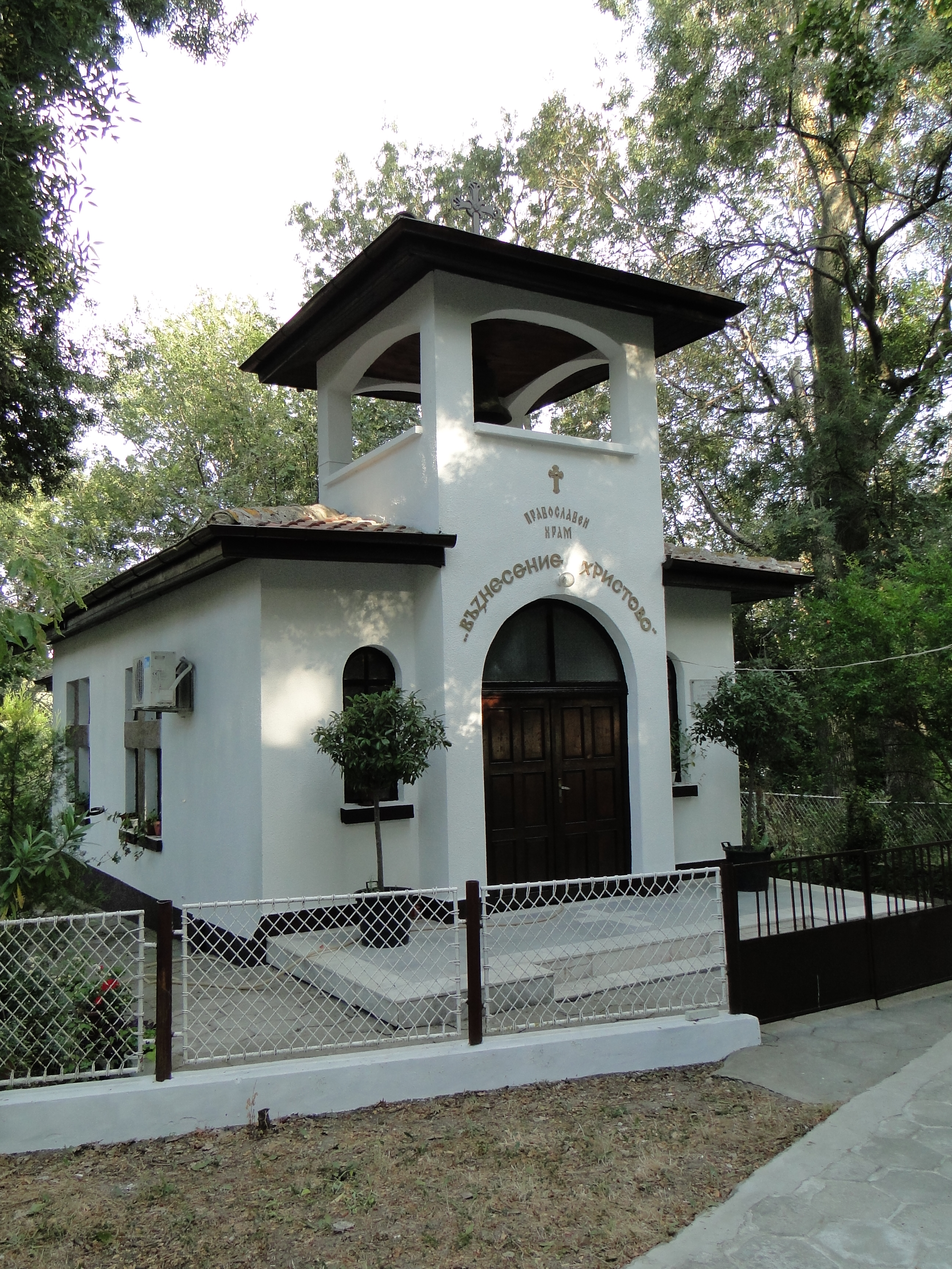 Китен Bulgaria